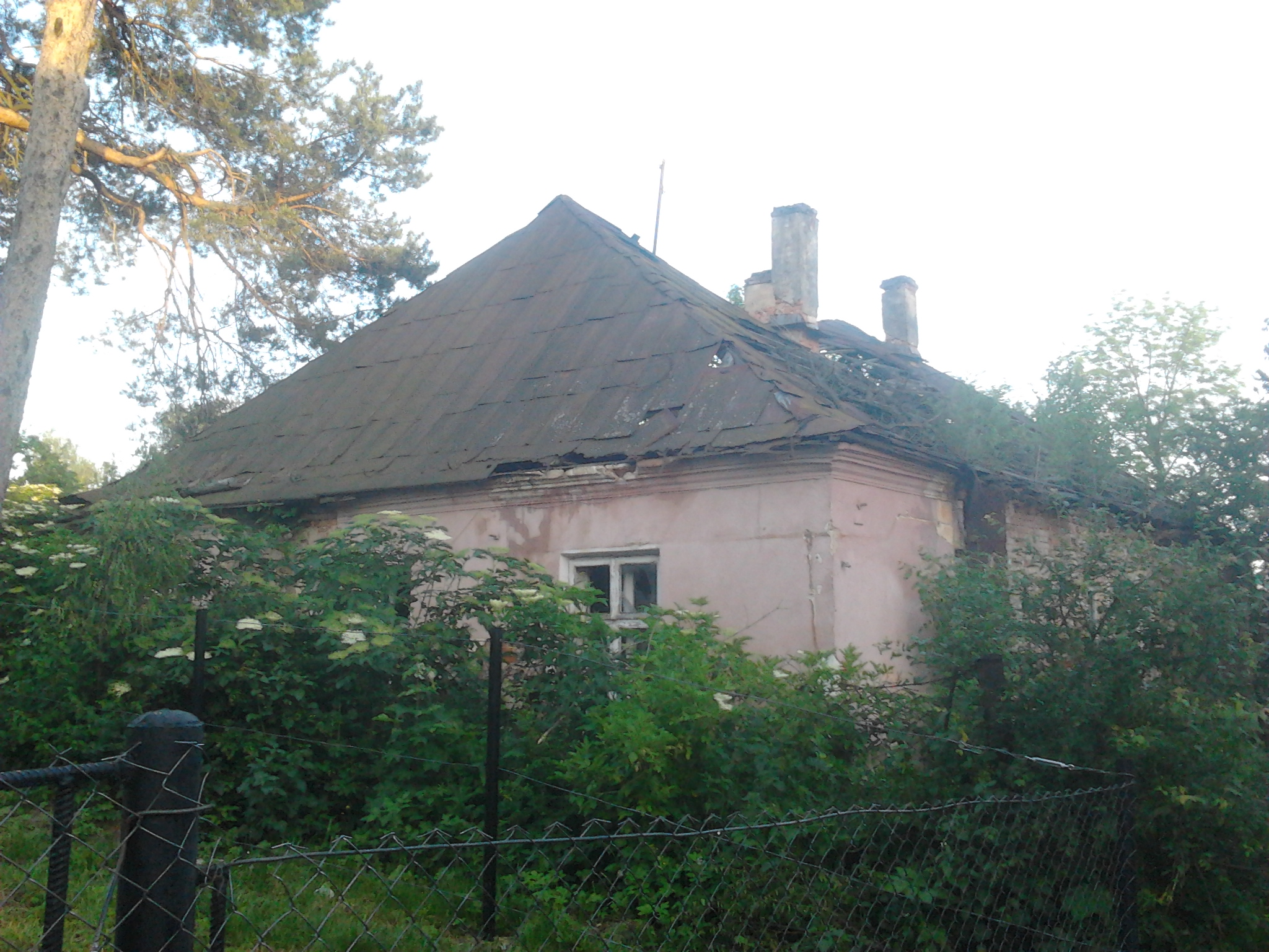 Колишня жандармерія